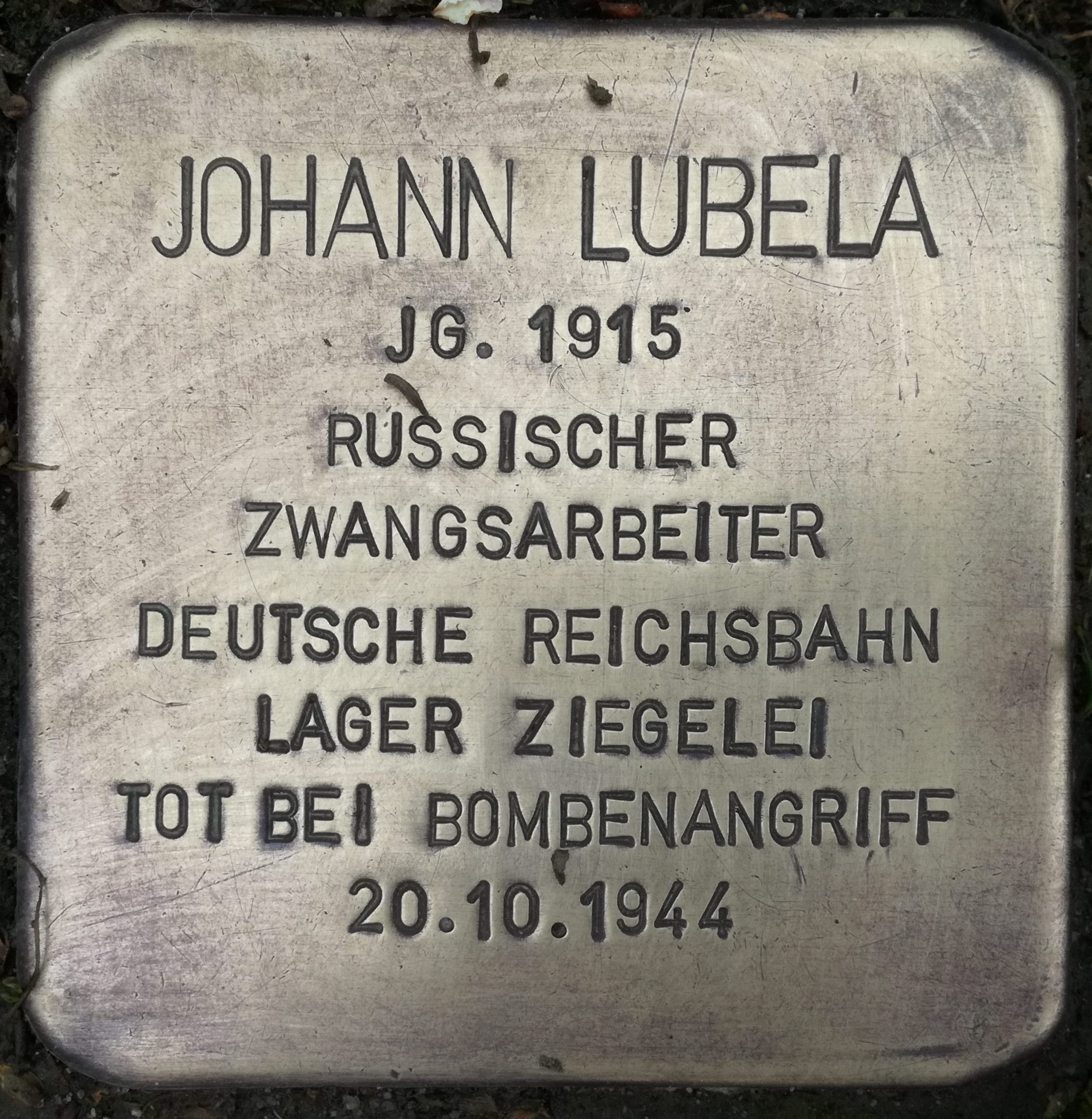 Johann Lubela Jahrgang 1915 Russischer Zwangsarbeiter Deutsche Reichsbahn Lager Ziegelei tot bei Bombenangriff 20.10.1944